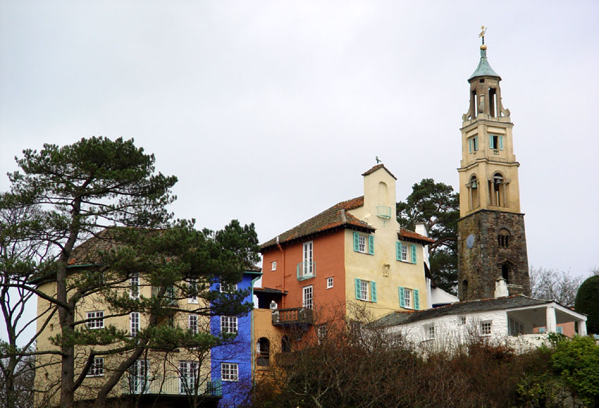 portmeirion